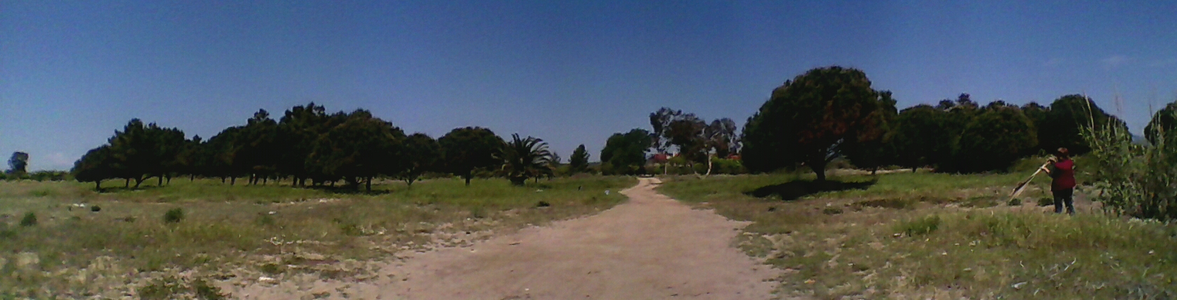 Agios Mamas seaside Chalkidiki, Greece